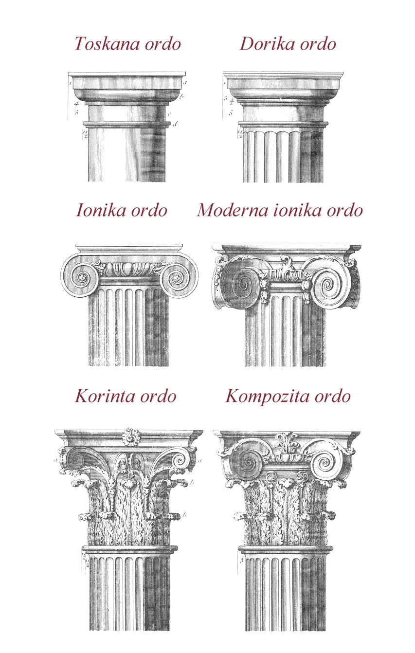 kapiteloj de la kvin klasikaj kolonaj ordoj (kaj aldone la "moderna ionika ordo") en superrigardo